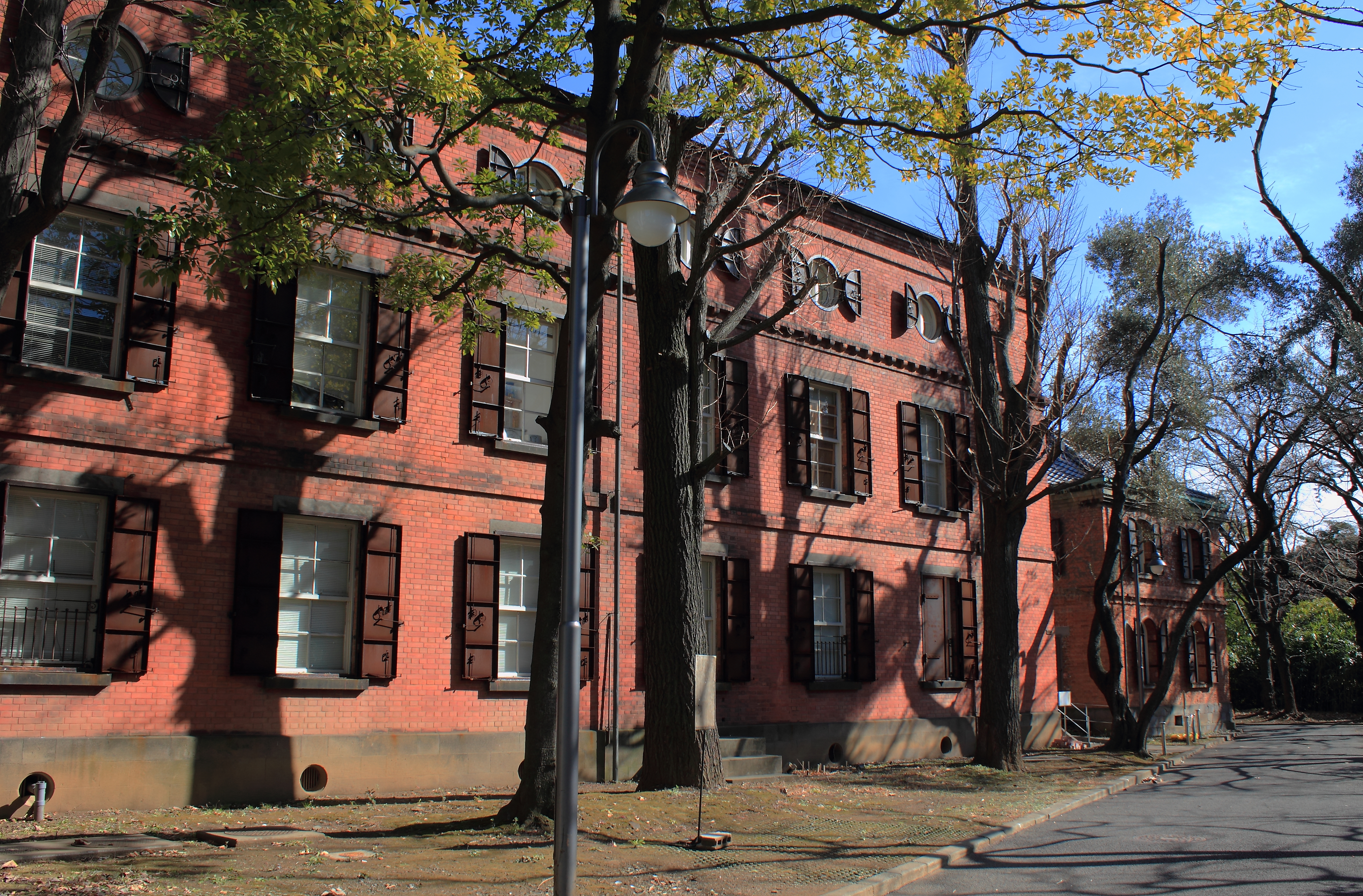 東京芸術大学音楽部内、赤レンガ1，2号館（東京都台東区）